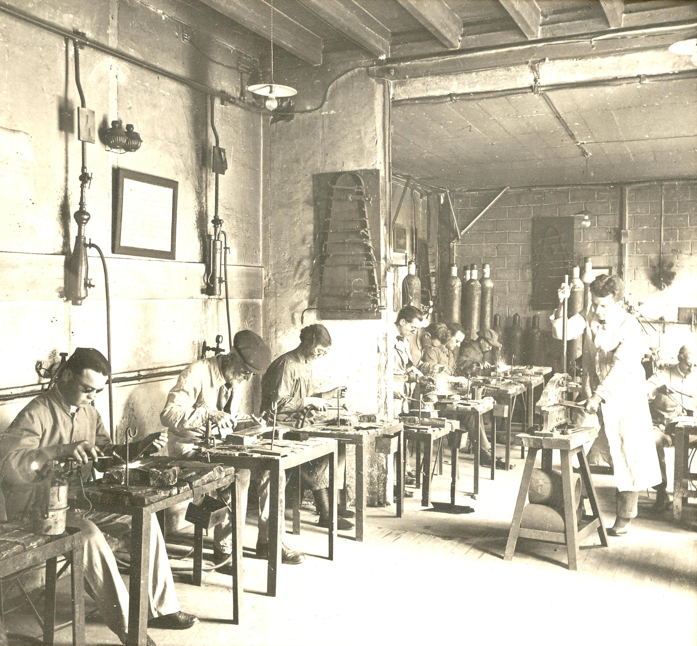 Cours à l'École supérieure de soudure autogène (ESSA)